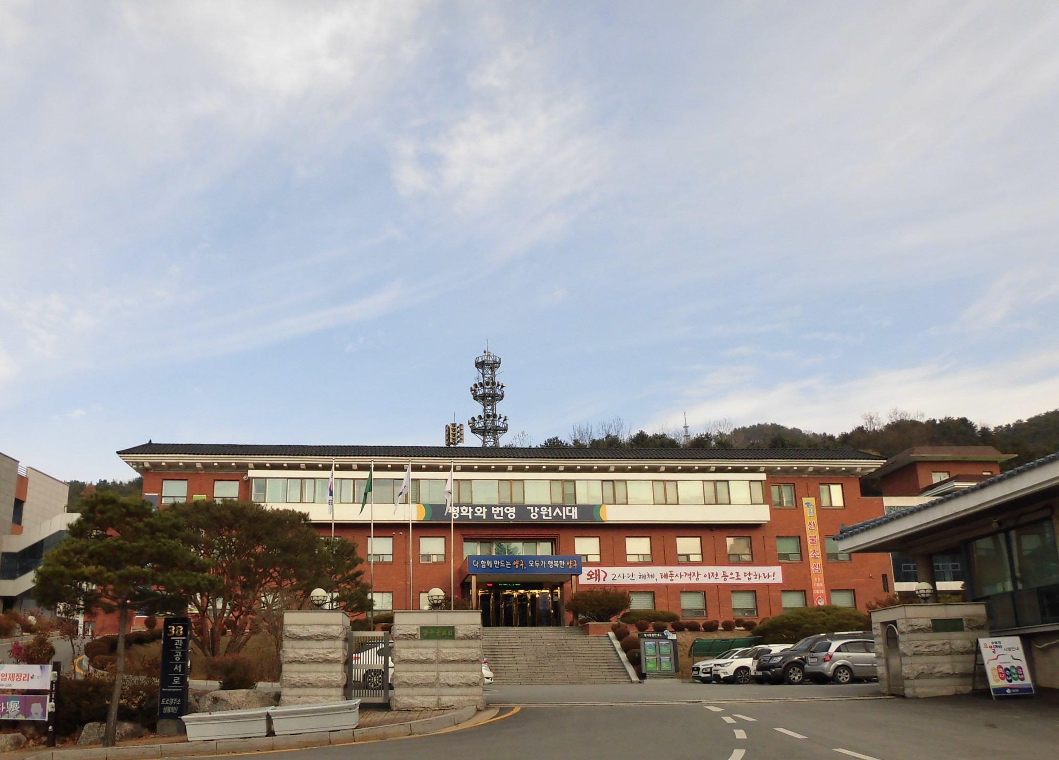 강원도 양구군에 있는 양구군청